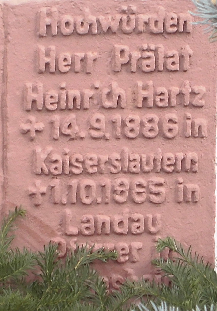 Grabinschrift von Prälat Heinrich Hartz auf dem Friedhof Deidesheim an der Westwand der Friedhofskapelle